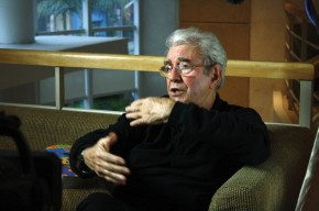 Ator brasileiro Juca de Oliveira em imagem do acervo da TV Brasil.